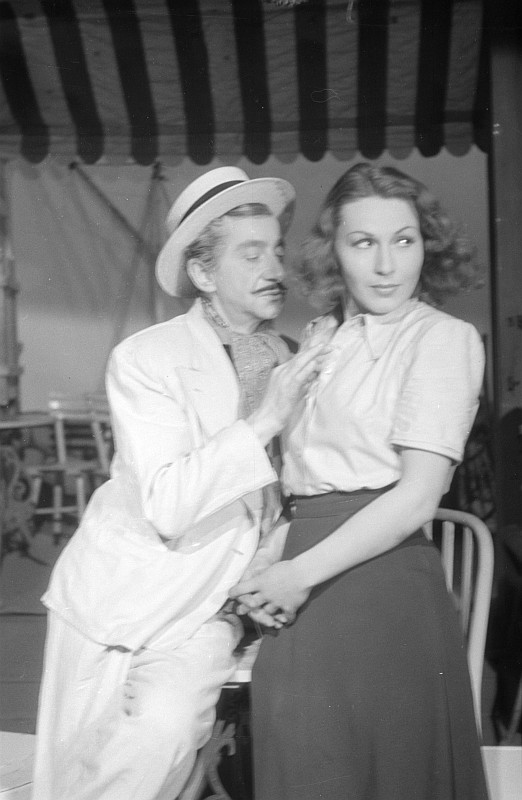 Original image description from the Deutsche FotothekSzenenbilder & Porträt Gerty Soltau (rechts) in der Rolle der Fanny